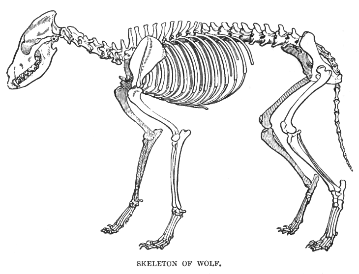 Wolf skeleton